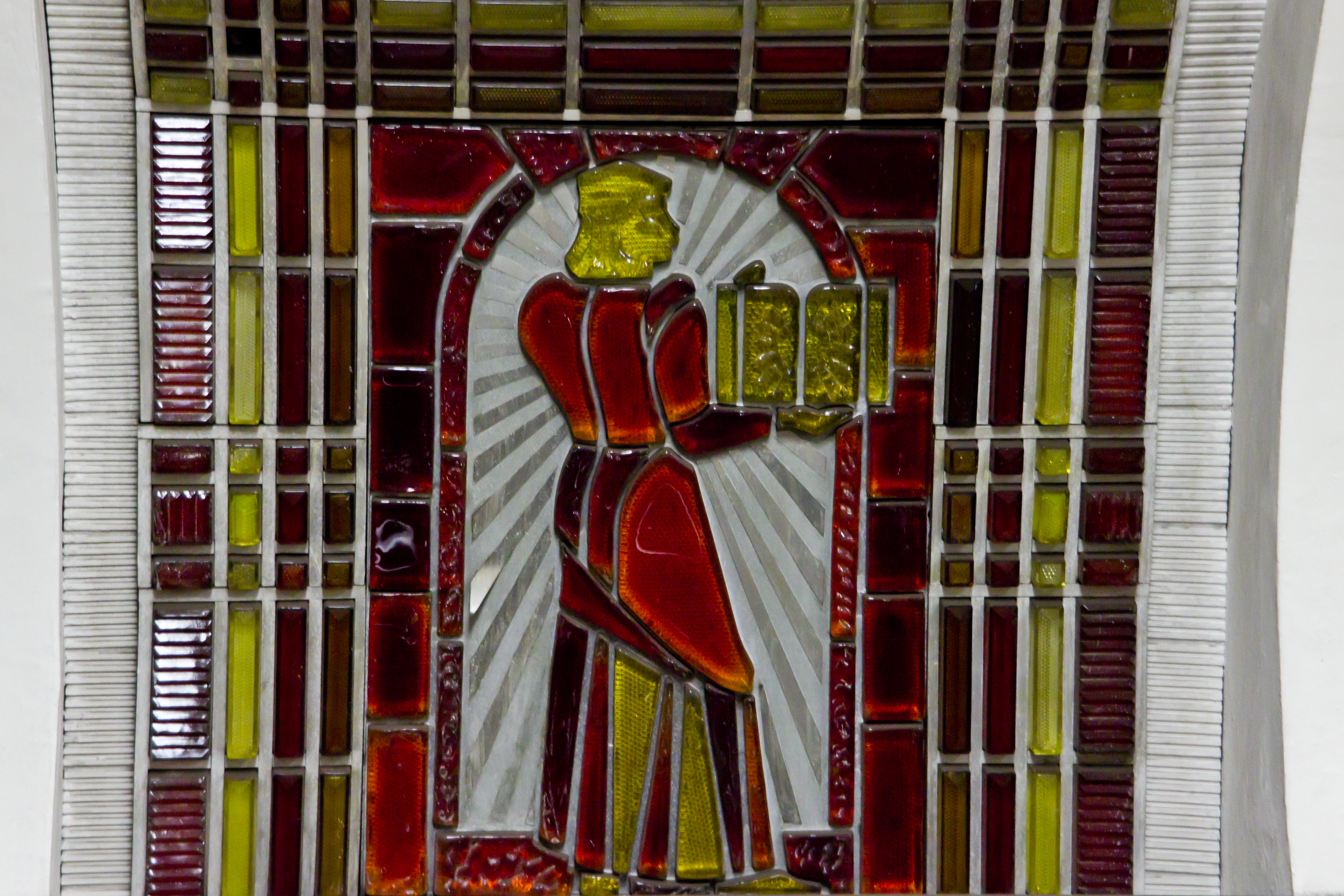 Станция метро «Институт культуры»